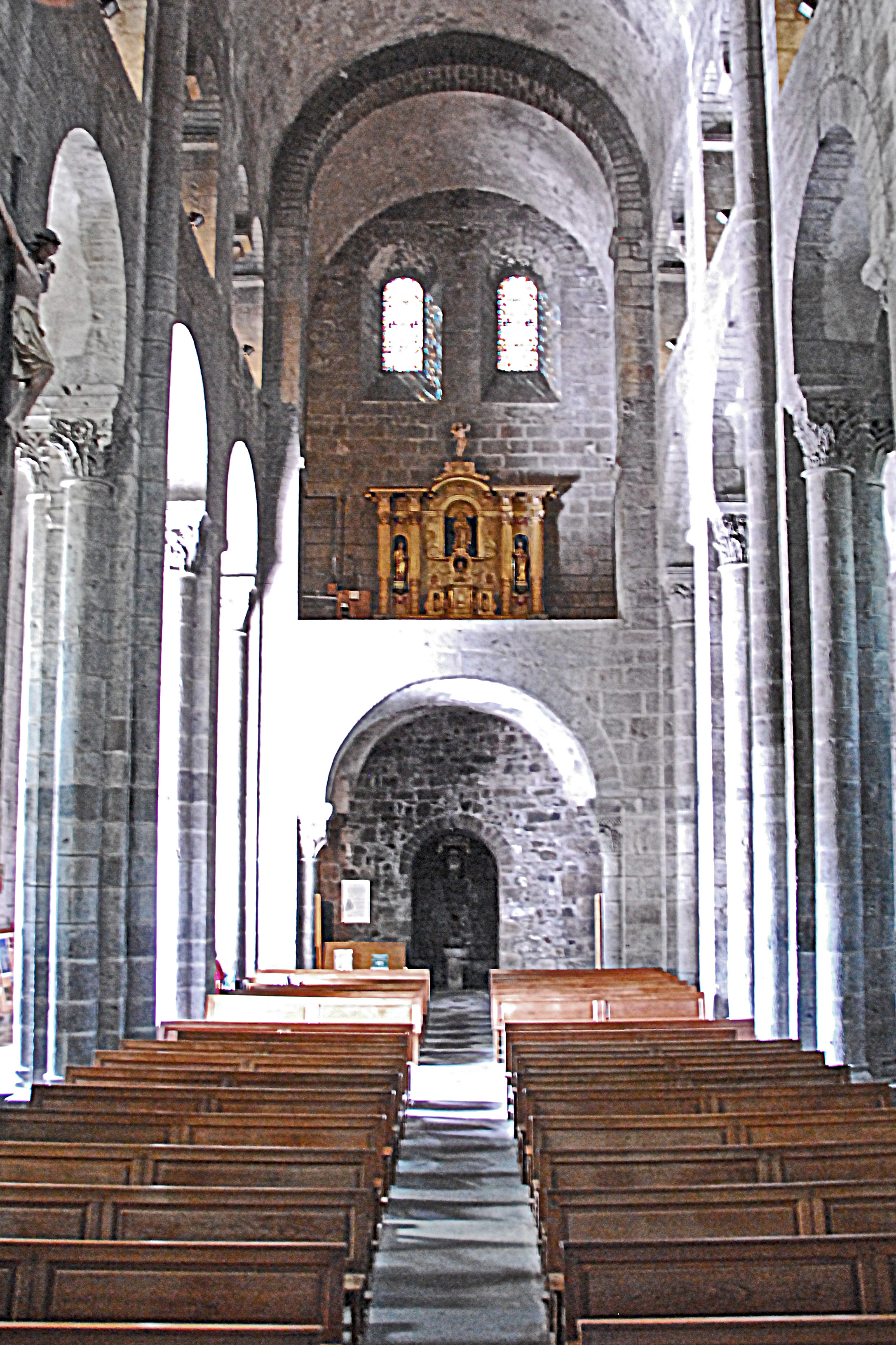 N.-D. d'Orcival, Mittelschiff zum Narthex